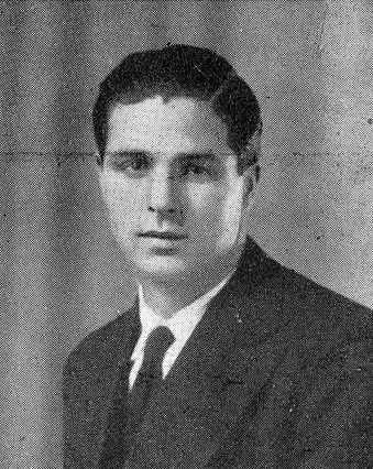 Maximino Romero de Lema, fotografía en Vida Gallega 1932